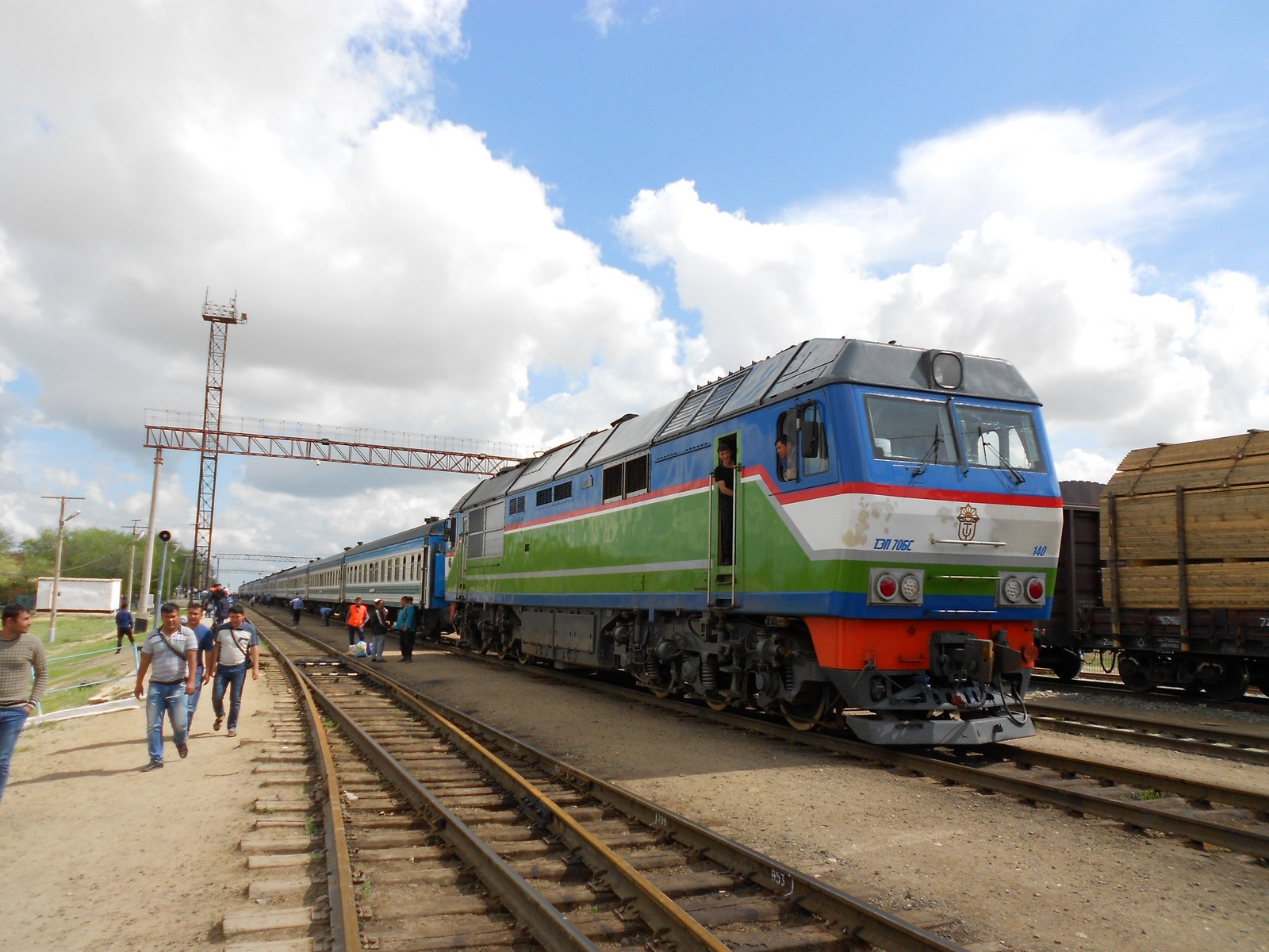 Железнодорожная станция Каракалпакия. Тепловоз ТЭП70БС-140 с пассажирским поездом